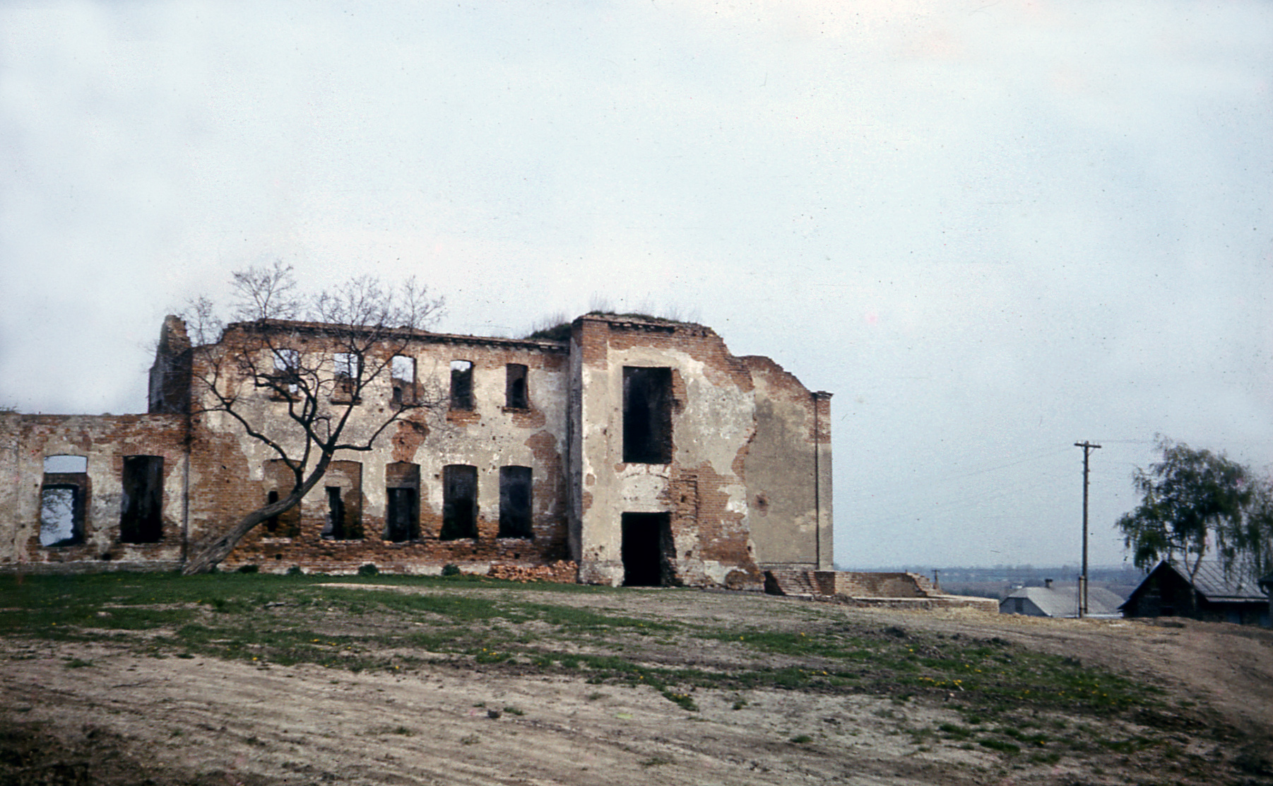 Село Зимне, руїни Зимненського монастиря (Святогорський Успенський Зимненський ставропігійний монастир), 1988 р.